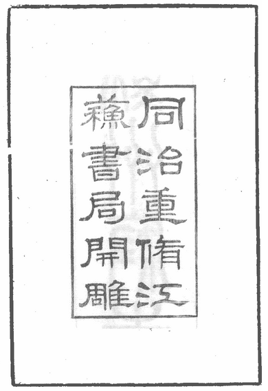 中文（中国大陆）: 同治重修 江苏数据开雕